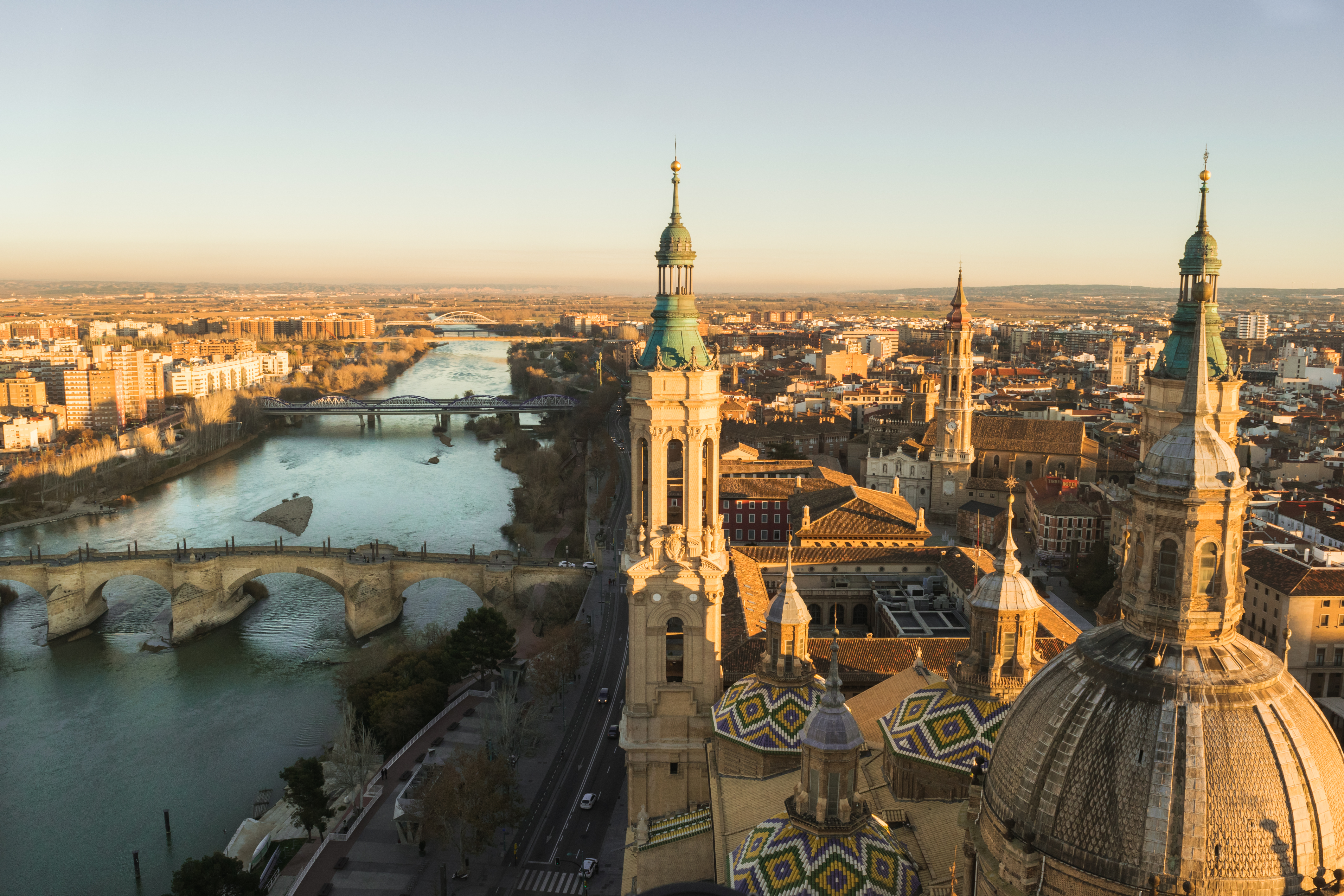 Vista de Zaragoza y el río Ebro.